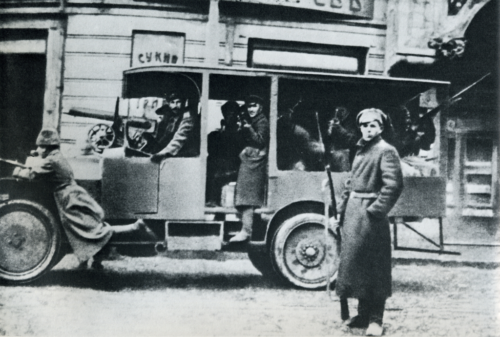 Wachabteilung der Roten Armee, Moskau